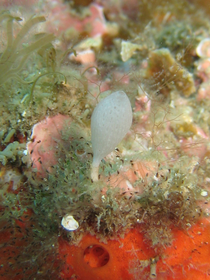 Clathrine pedonculée (Guancha lacunosa) en Méditerranée près de Banyuls